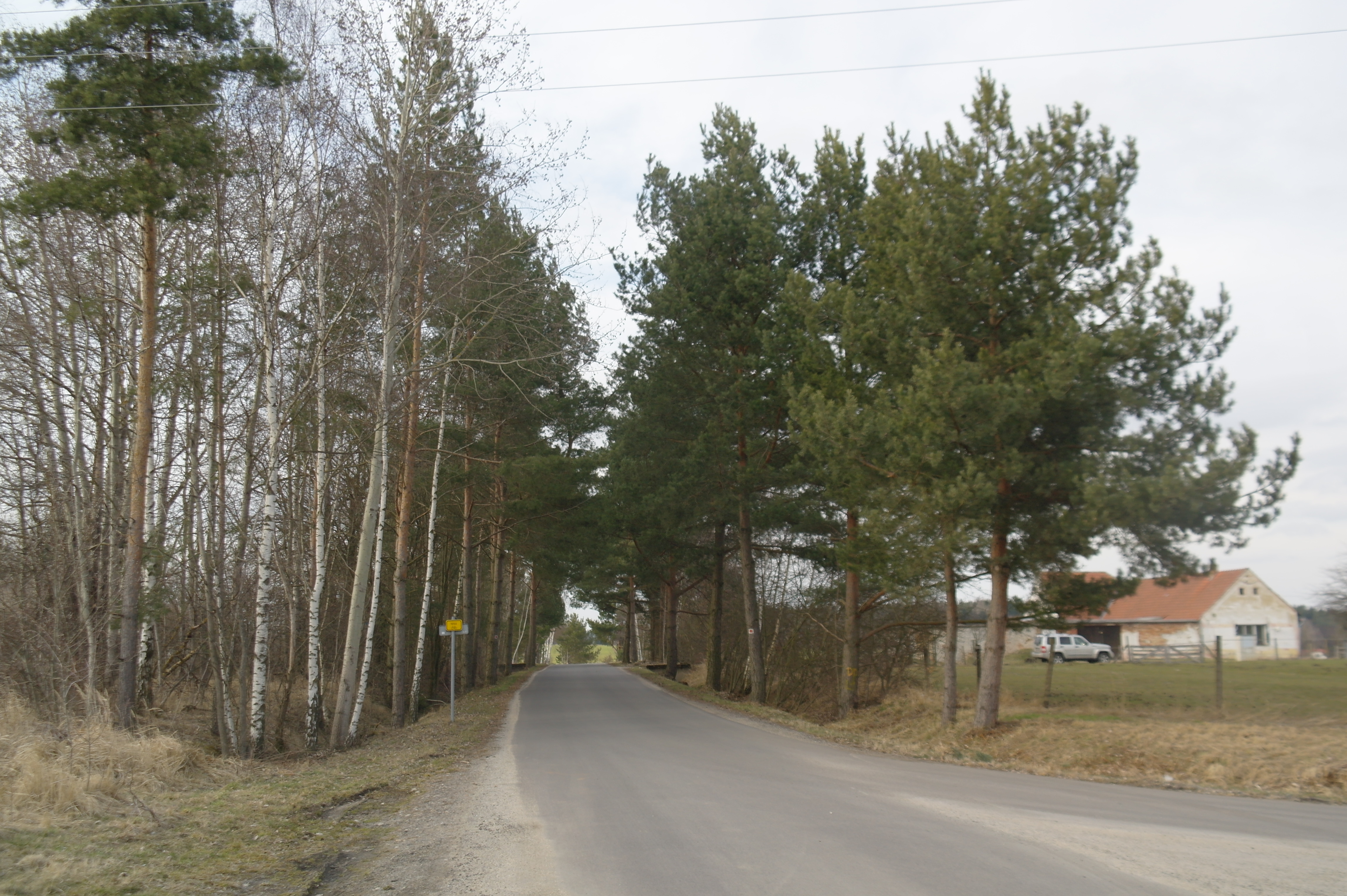 Růžov, silnice směrem k Ledenicím